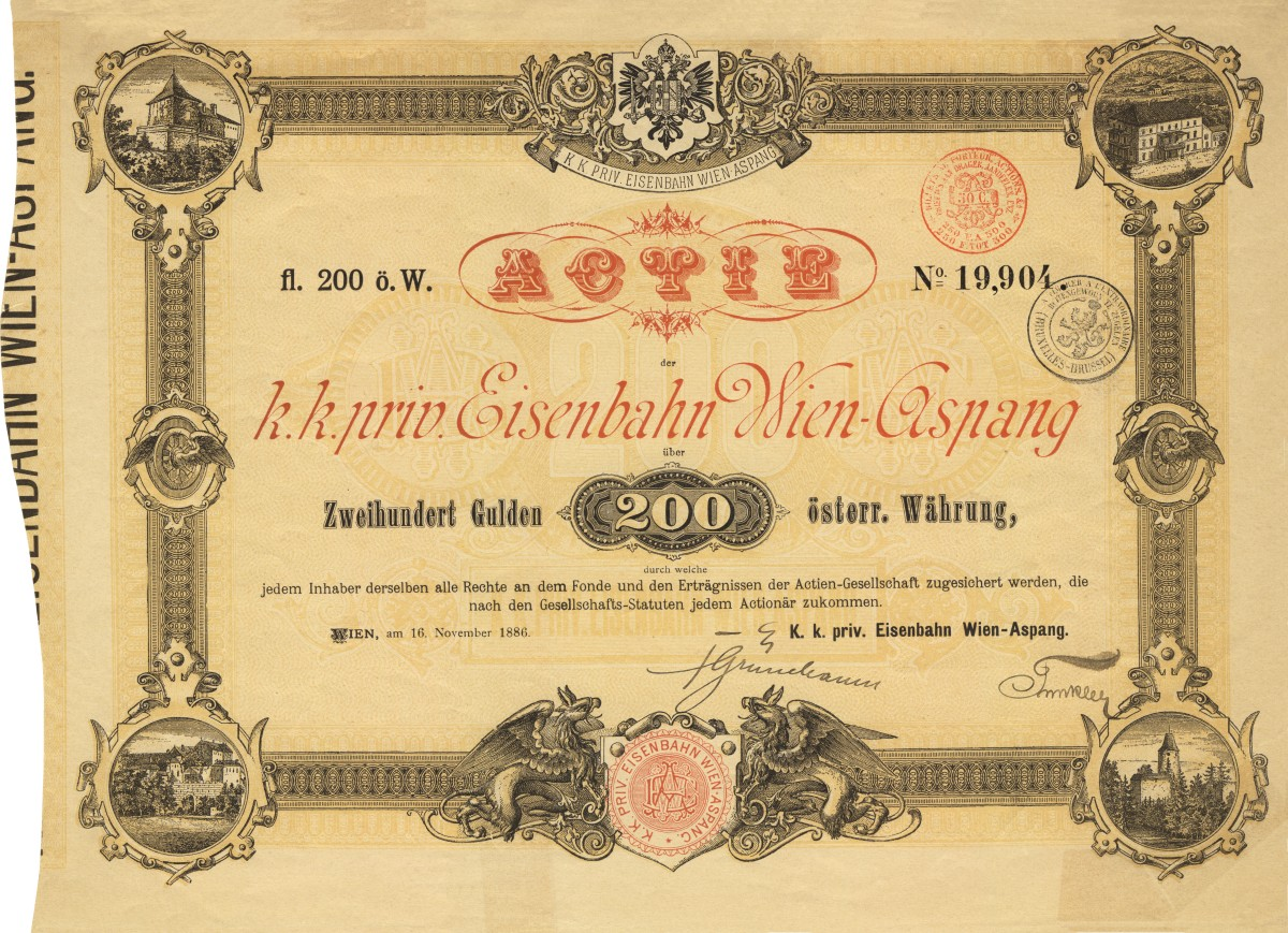 Aktie der k.k. priv. Eisenbahn Wien-Aspang